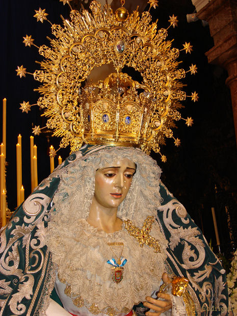 Fotografía propia realizada por Triana